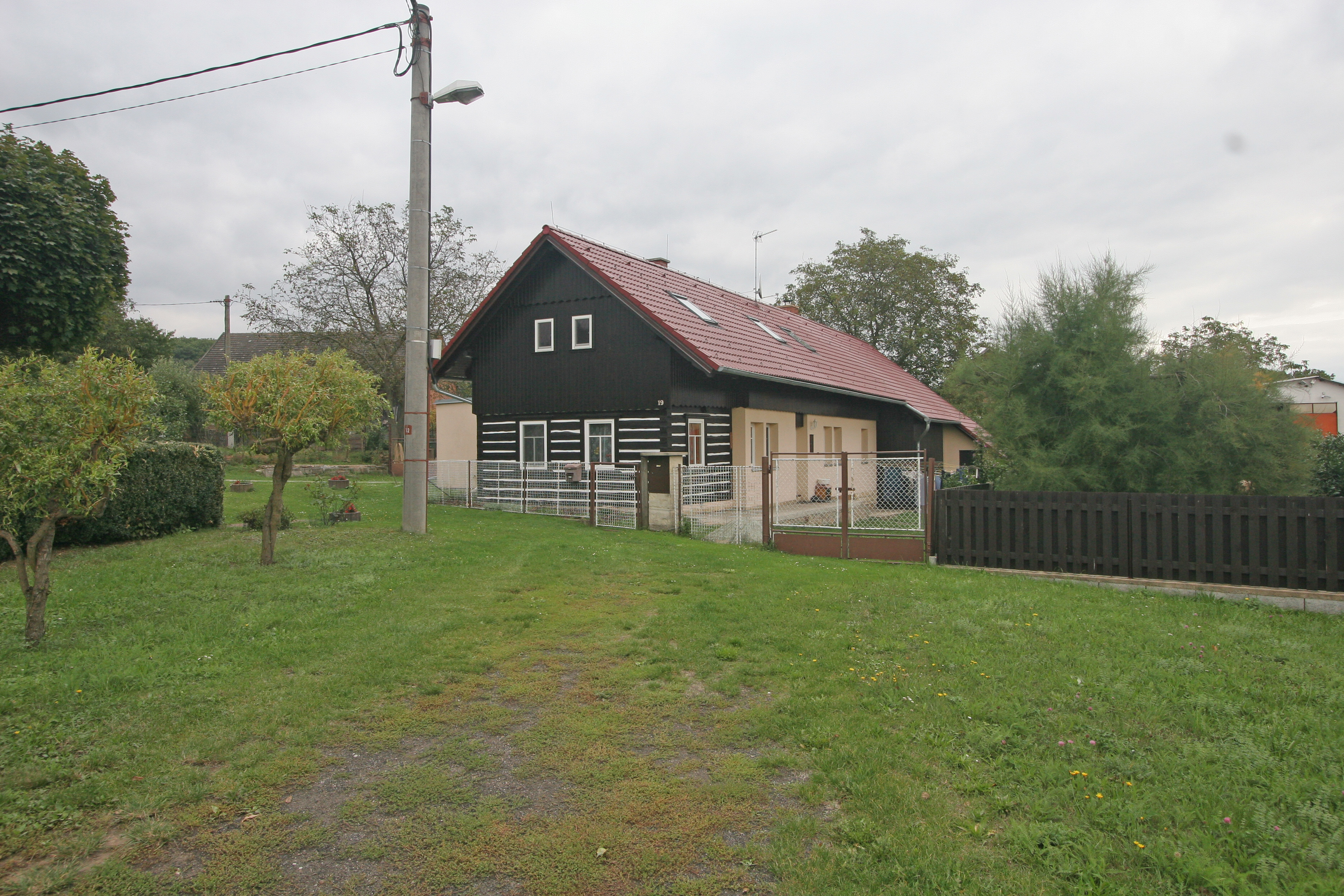 Votuz čp. 19